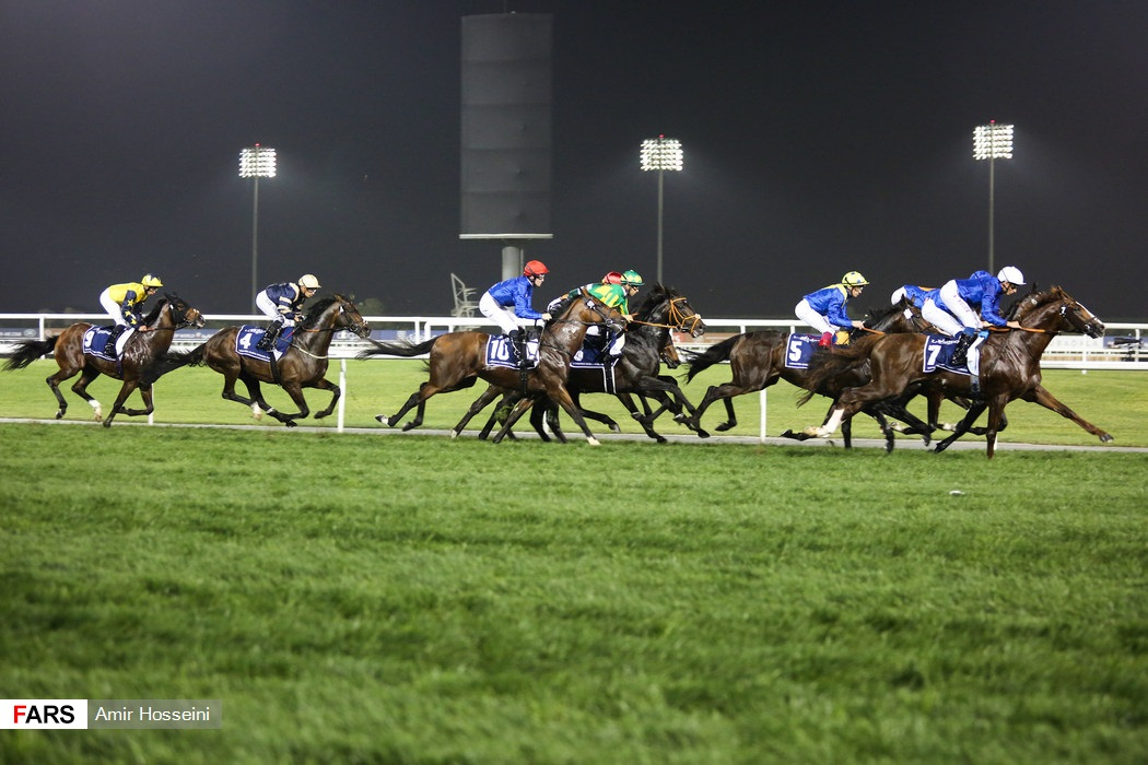 جام جهانی اسب‌دوانی ۲۰۱۸ - دبی بیست و سومین دوره رقابت‌های اسب‌دوانی جام جهانی دبی عصر شنبه یازدهم فروردین ماه در 9 دور به مسافت‌های مختلف در پیست میدان دبی برگزار شد؛ دور نهم این رقابت‌ها که موسوم به کورس جام جهانی دبی (Dubai World Cup) است و با 10 میلیون دلار جایزه برای اسب‌های برتر، گران‌ترین کورس در سراسر جهان شناخته می‌شود.